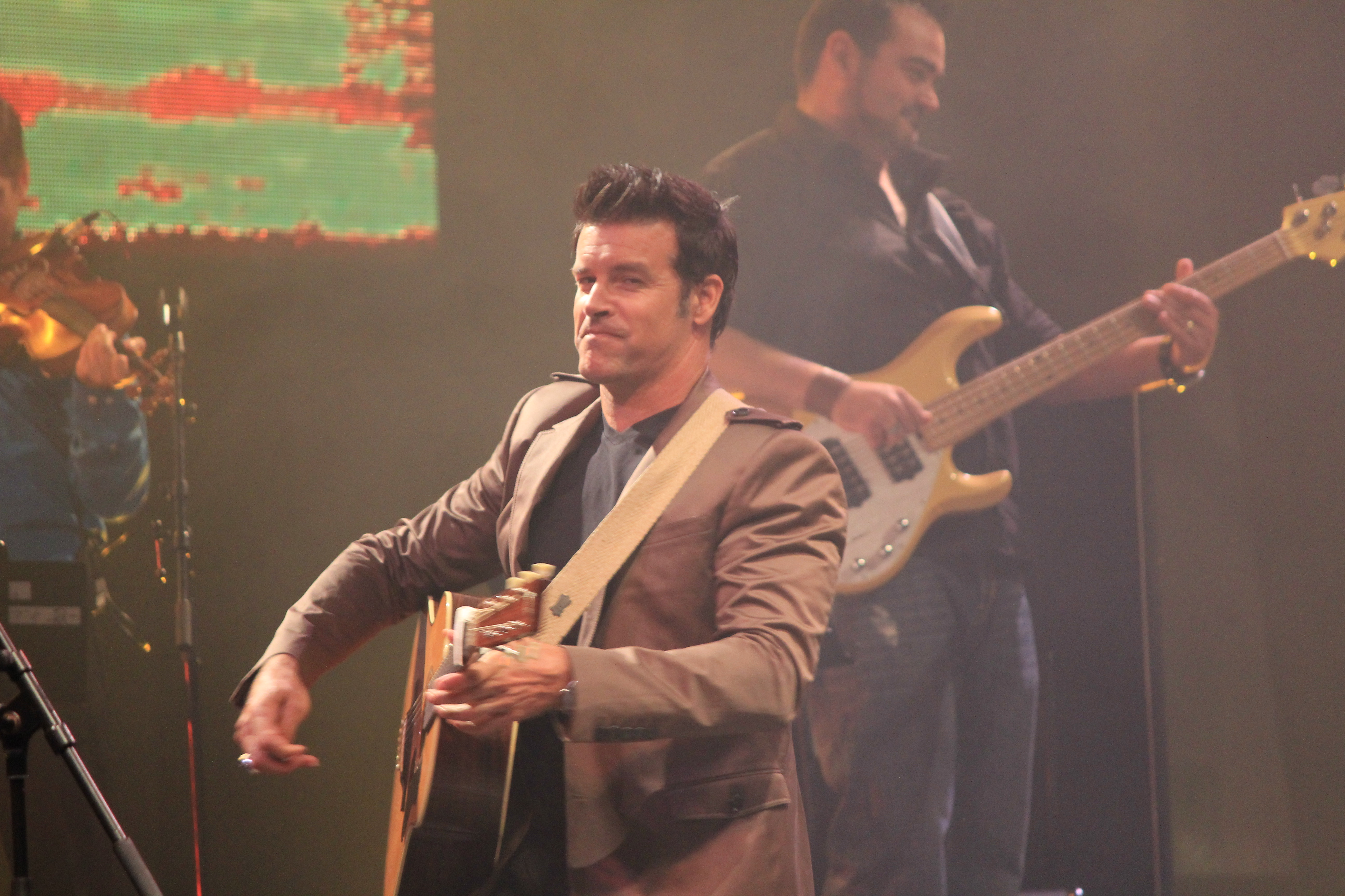 Roch Voisine lors de la soirée acadienne organisée dans le cadre du festival interceltique de Lorient 2012.